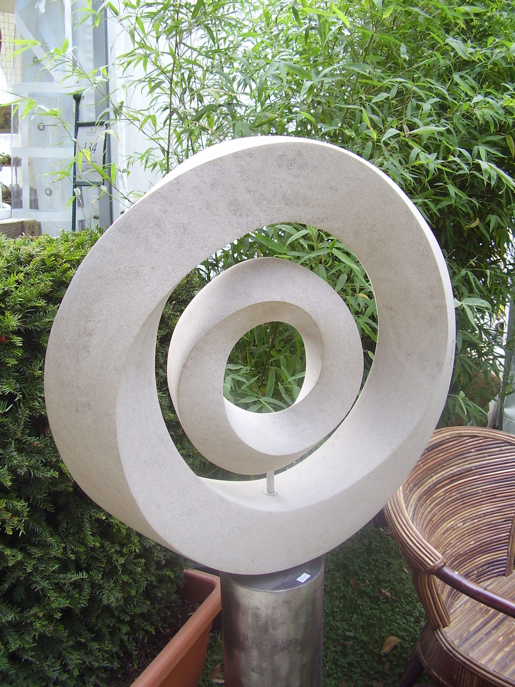 Moebius strip